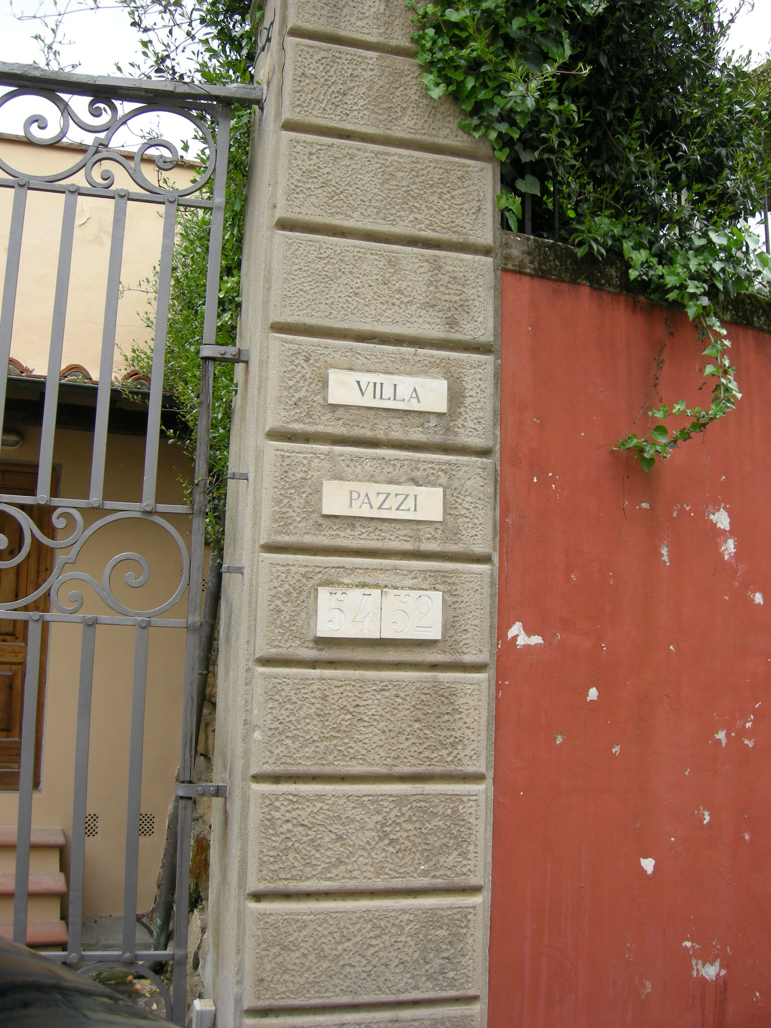 Villa Pazzi, ingresso